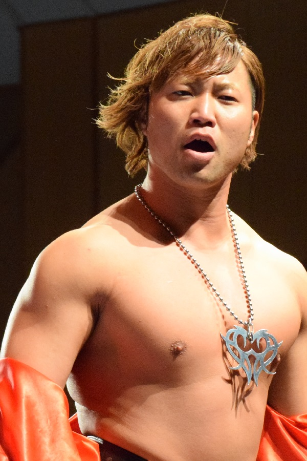 2018年12月6日 アゼリア大正 「2018 世界最強タッグ決定リーグ戦」 宮原健斗